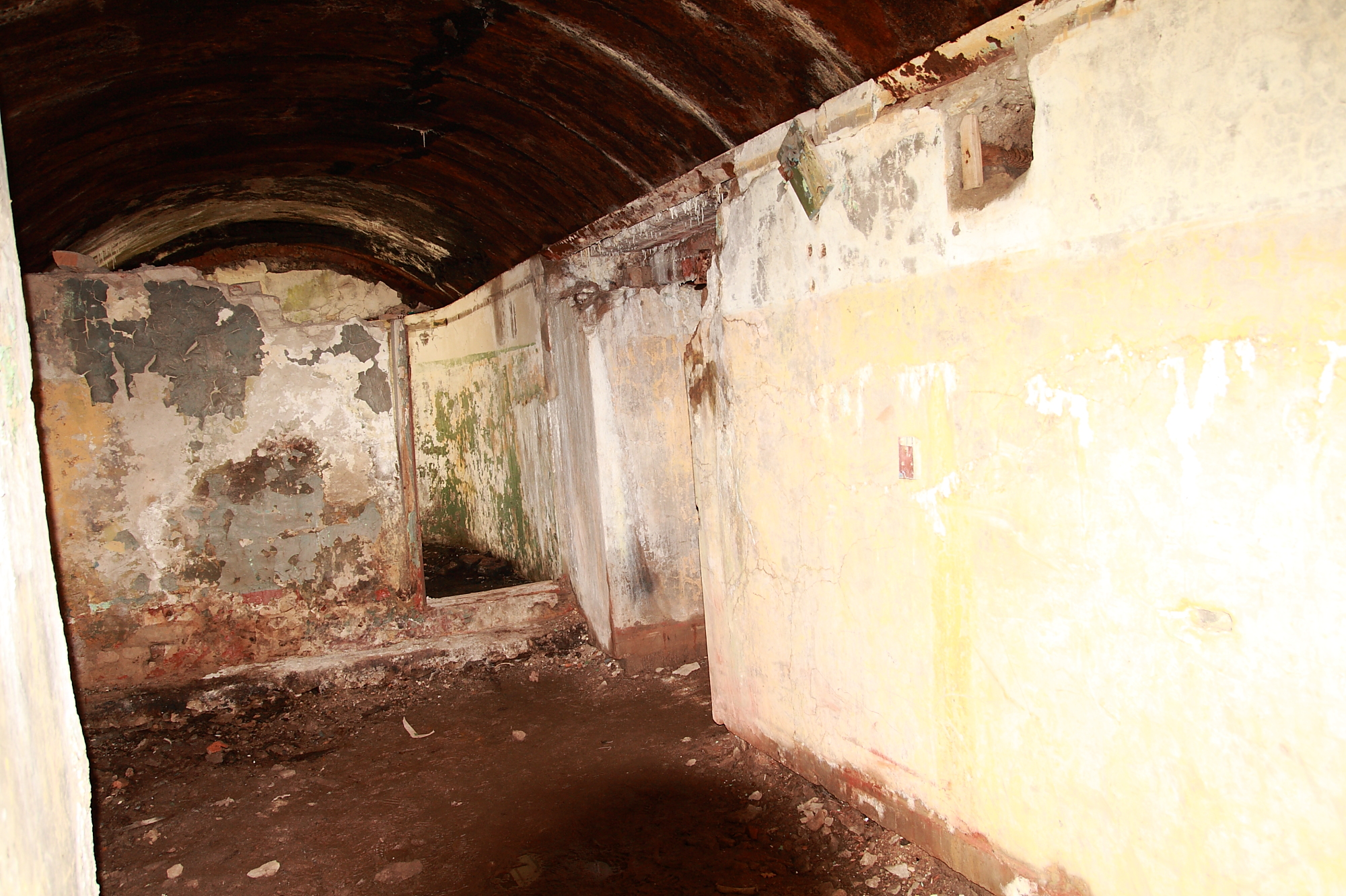 Peeter Suure merekindluse Humala positsiooni rooduvarjend nr.1, 1916